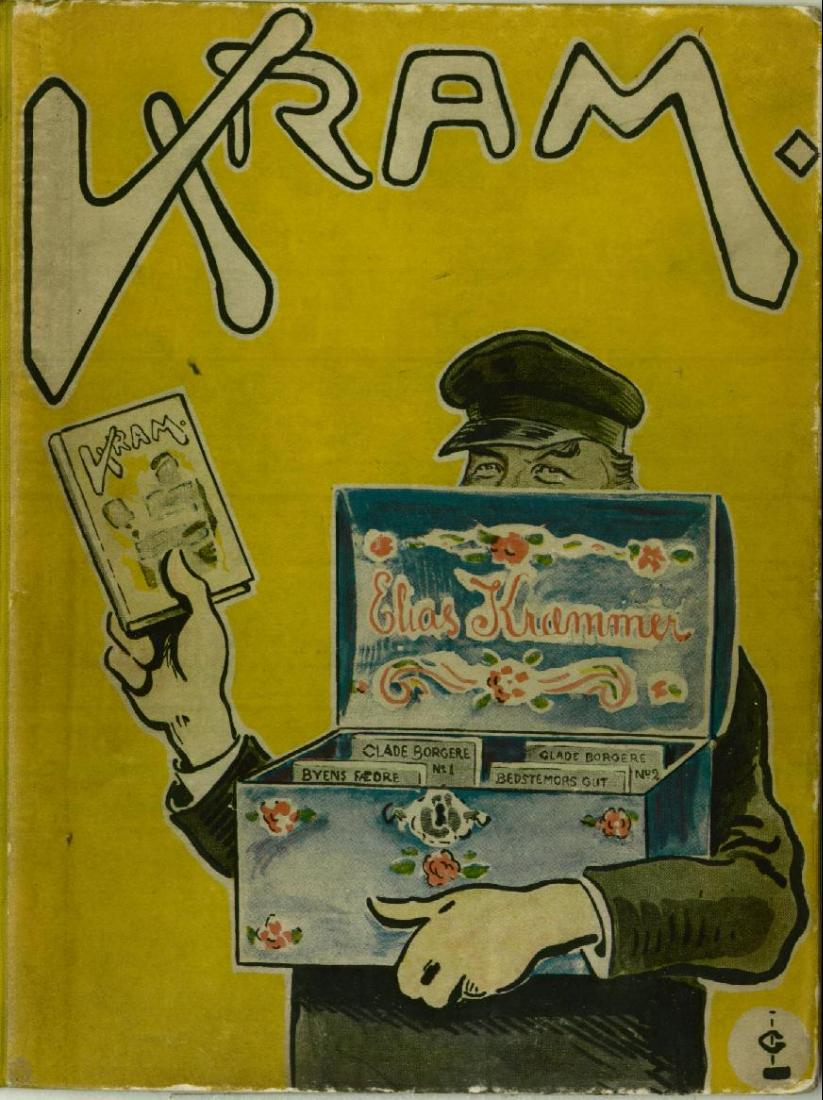 Omslaget til Elias Kræmmers Kram fra 1904. Tegning av Gustav Lærum.